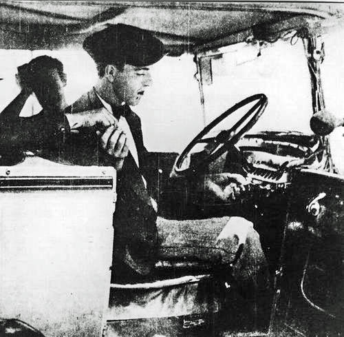 Taxi-colectivo de la línea 31 (hoy 60) con boletera.